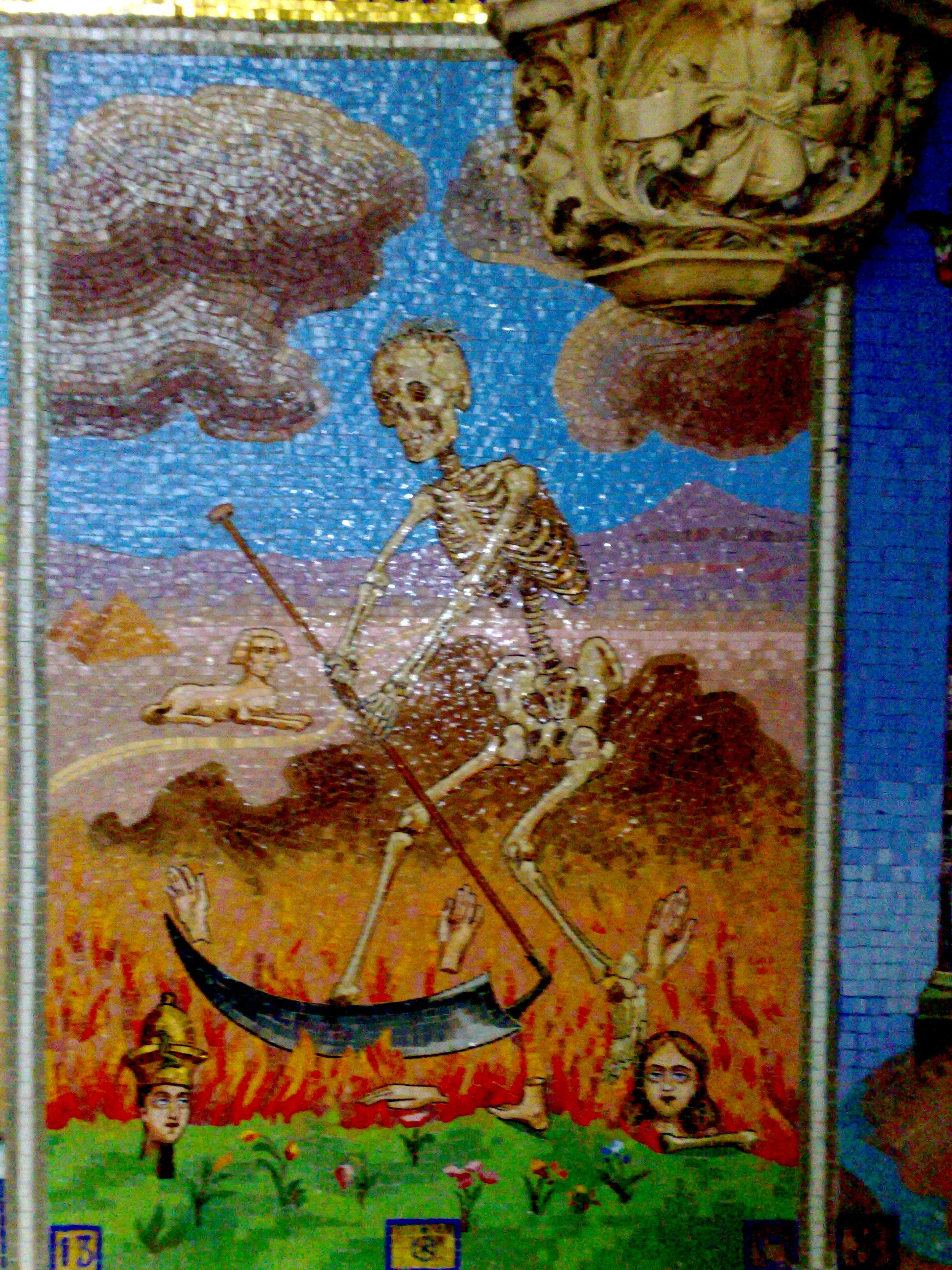 Mosaïque de la Chapelle du château des Avenières à Cruseilles en Haute-Savoie, France, représentant la carte de la Mort des Tarots divinatoires.